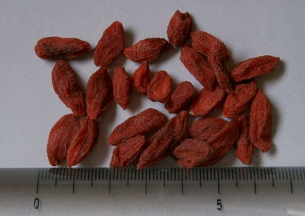 Dried wolfberries